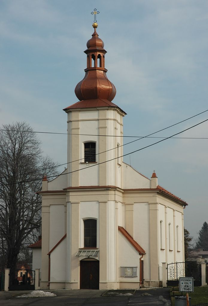 Kostel sv. Marka, Ostrava-Heřmanice